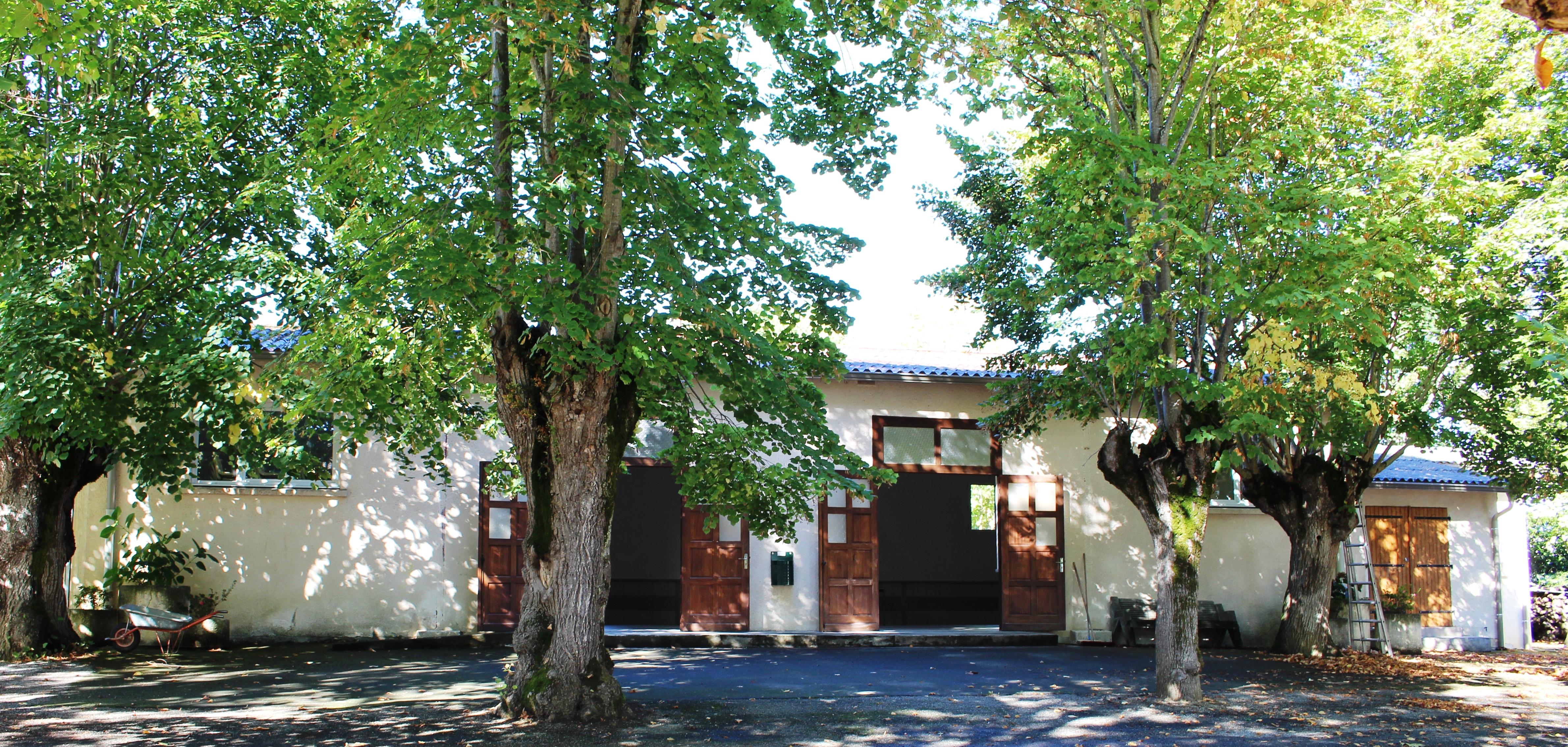 Foyer rural de Sauveterre (Hautes-Pyrénées)